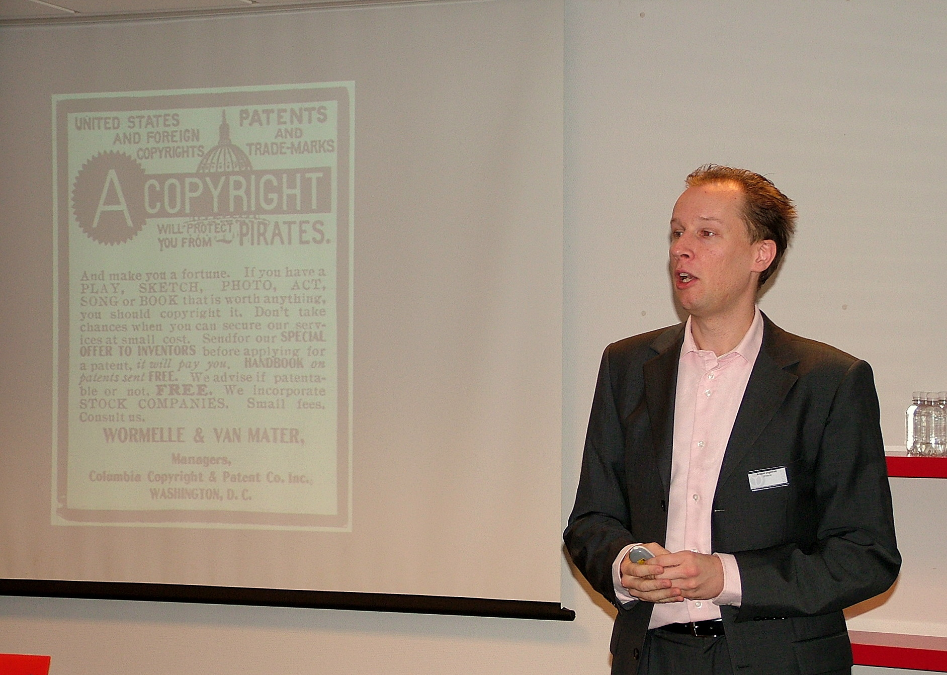 Wikimedia Conferentie 2008, Vereniging Wikimedia Nederland. Arnoud Engelfriet: Auteursrecht, verleden en toekomst.